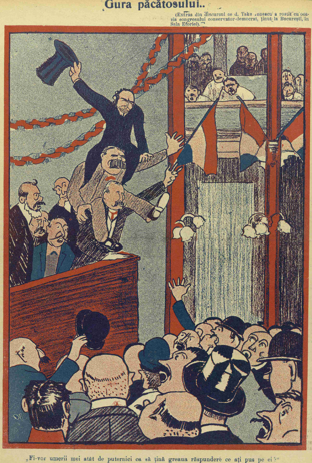 Caricatură din revista Furnica, nr. anul IV, nr 179, joi 14 februarie 1908, pagina 4